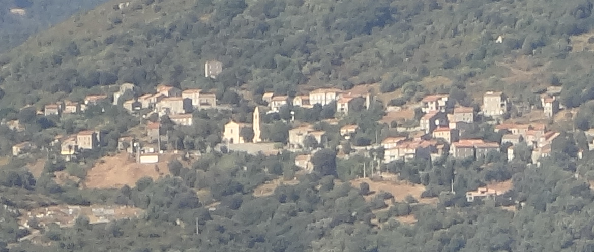 Pila-Canale, Corse du Sud